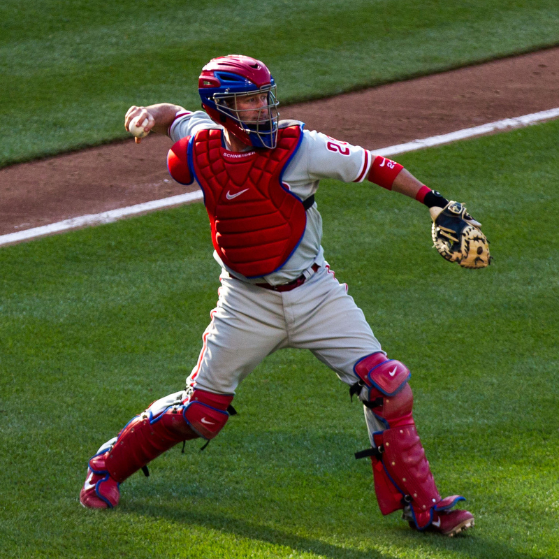 Brian Schneider